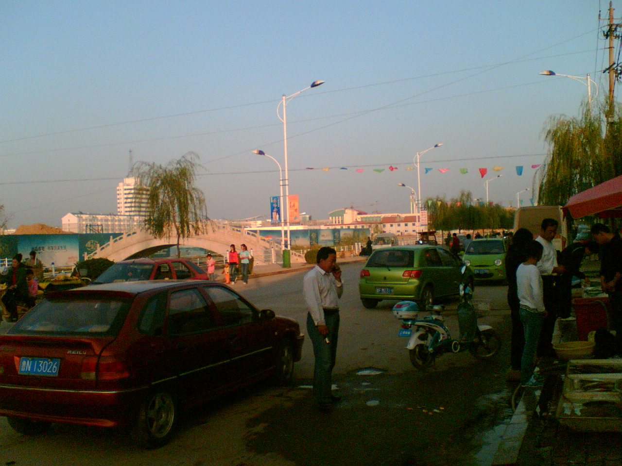 中华人民共和国山东省乐陵市街景